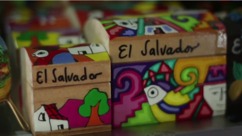 artesaniapalma